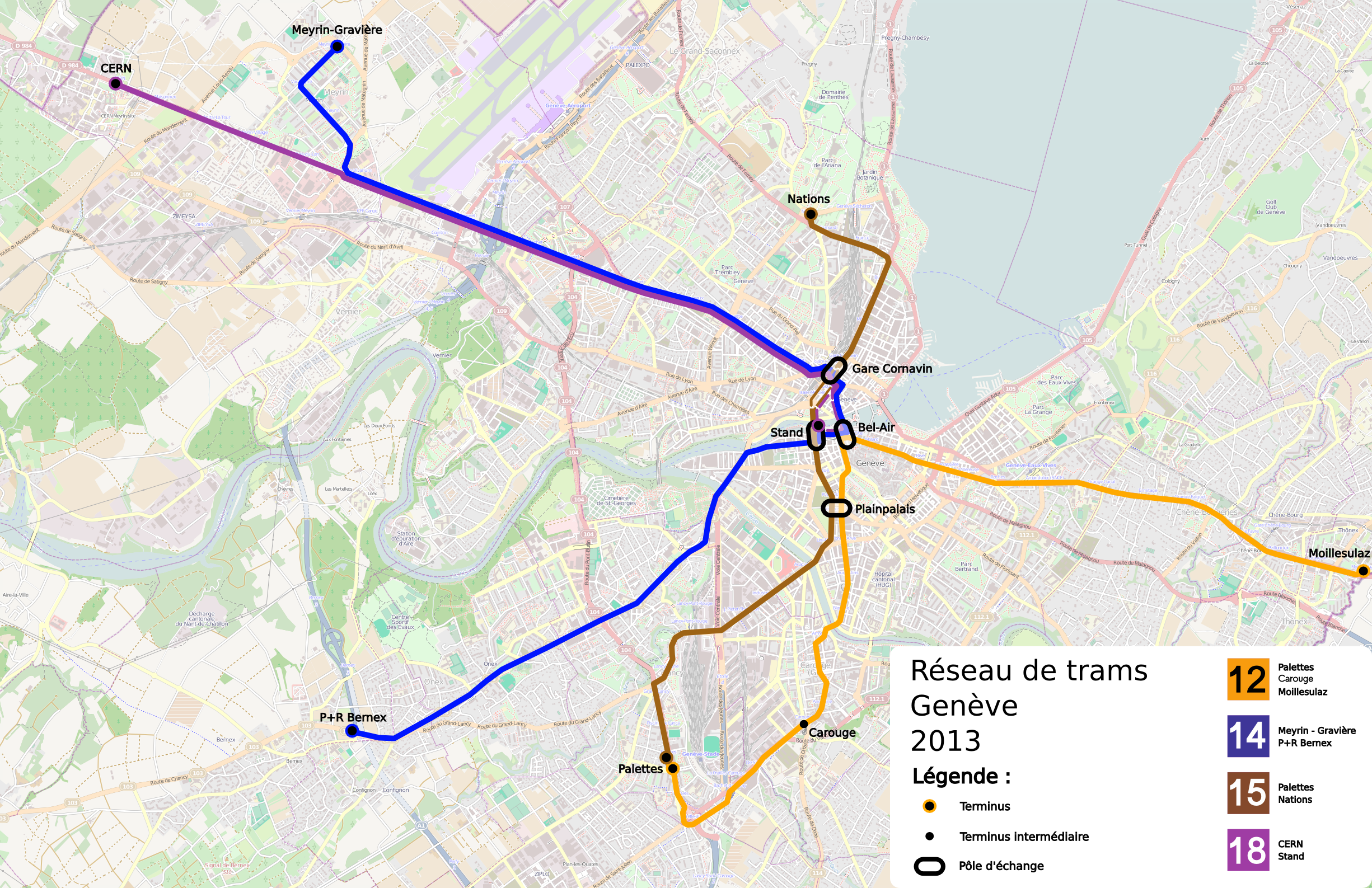 Plan de réseau des tramways de Genève dès le 9 décembre 2012. Carte de fond : OpenStreetMap